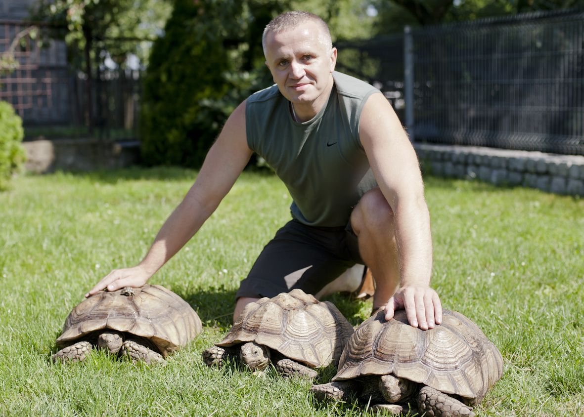 Romuald Jończy z żółwiami pustynnymi